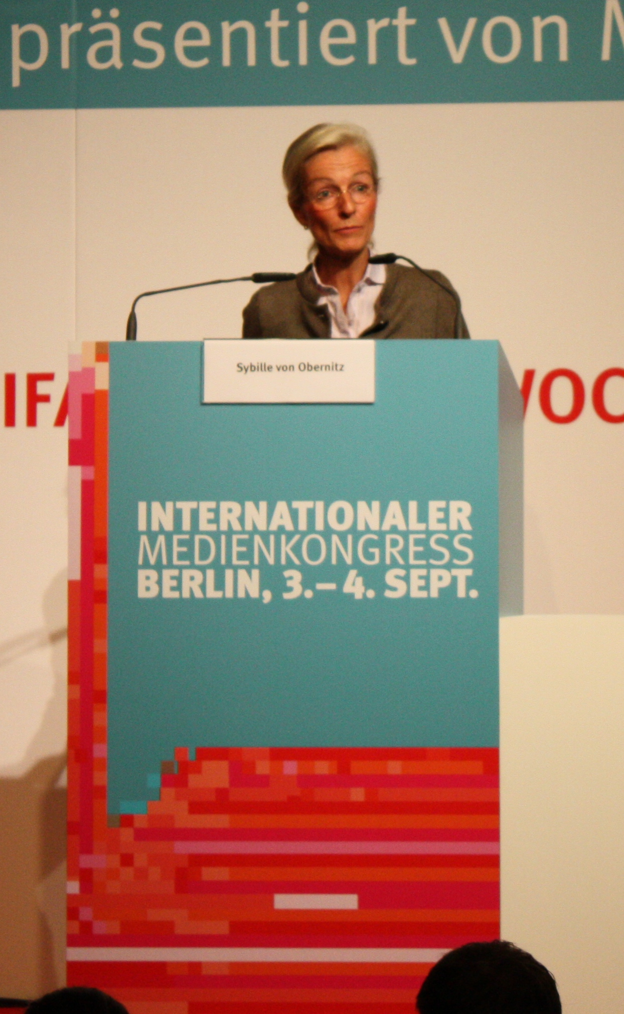 Internationaler Medienkongress im Rahmen der Internationale Funkausstellung 2012, Sybille von Obernitz